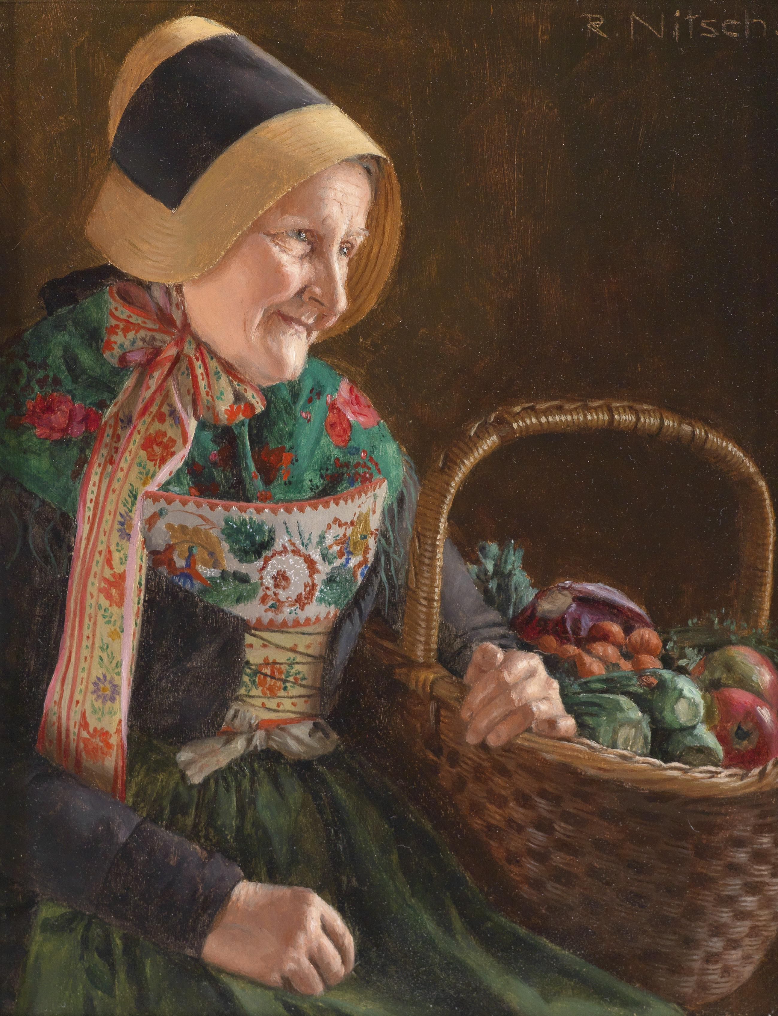 Mönchguterin von der Insel Rügen, Öl auf Holz, 18.3 x 14 cm